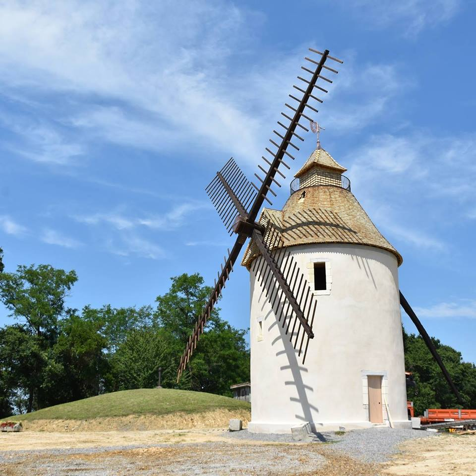 Moulin à vent de Bénesse-lès-dax